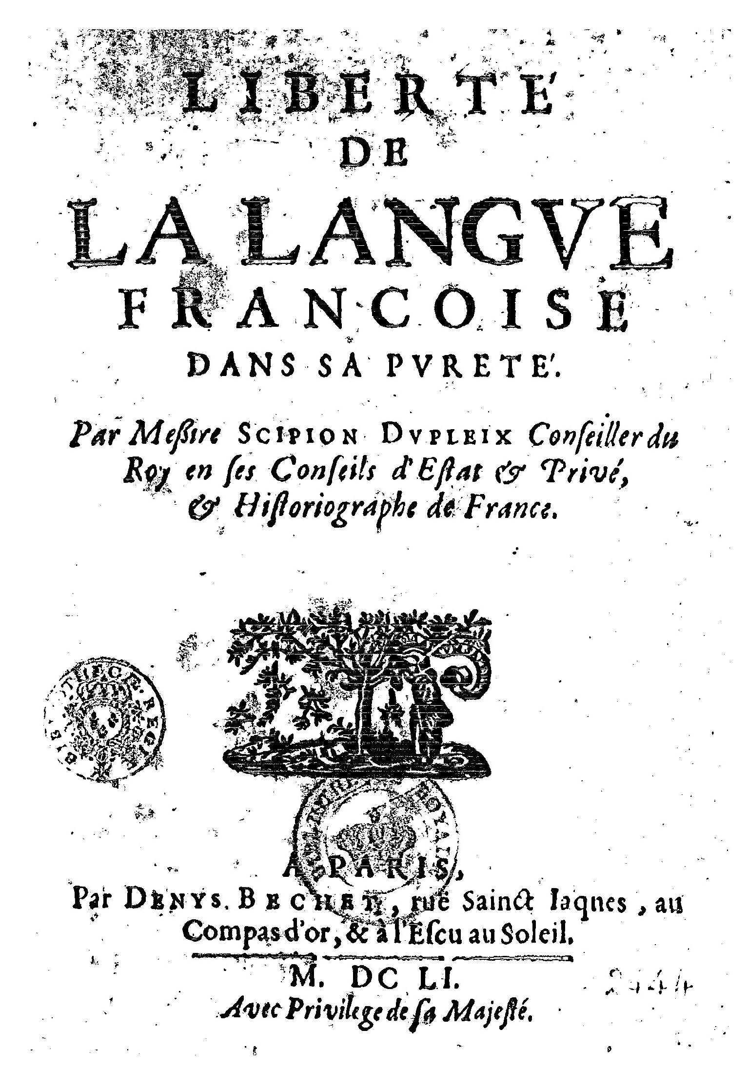 Liberté de la langue françoise dans sa pureté / par messire Scipion Dupleix (1569-1661). Editeur : Denys Béchet (Paris), 1651